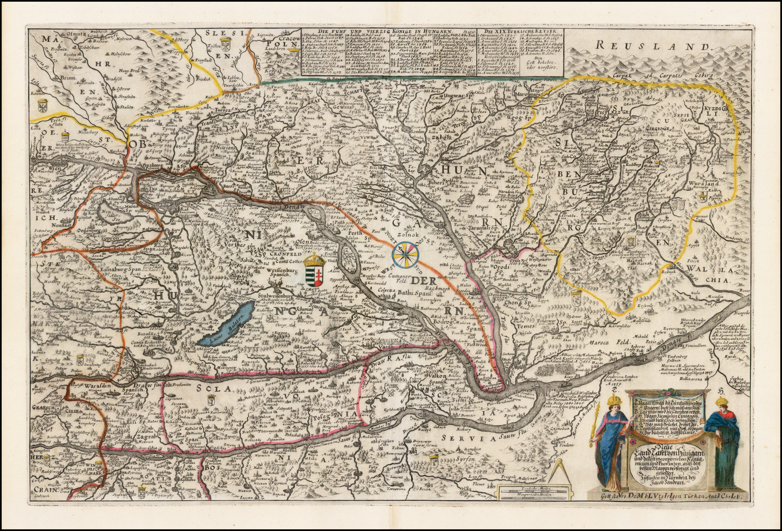 Neue Land-Tafel von Hungarn und dessen incorporirten Königreichen und Provinzen: auß den besten Mappen verfertigt und gebessert